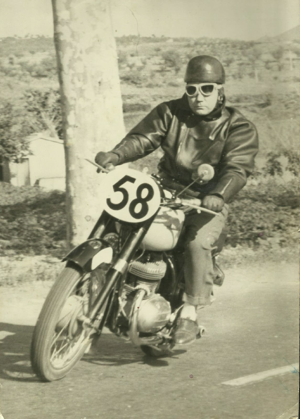 Genís Ros amb la Derbi 350 a la Volta al Vallès del 1969